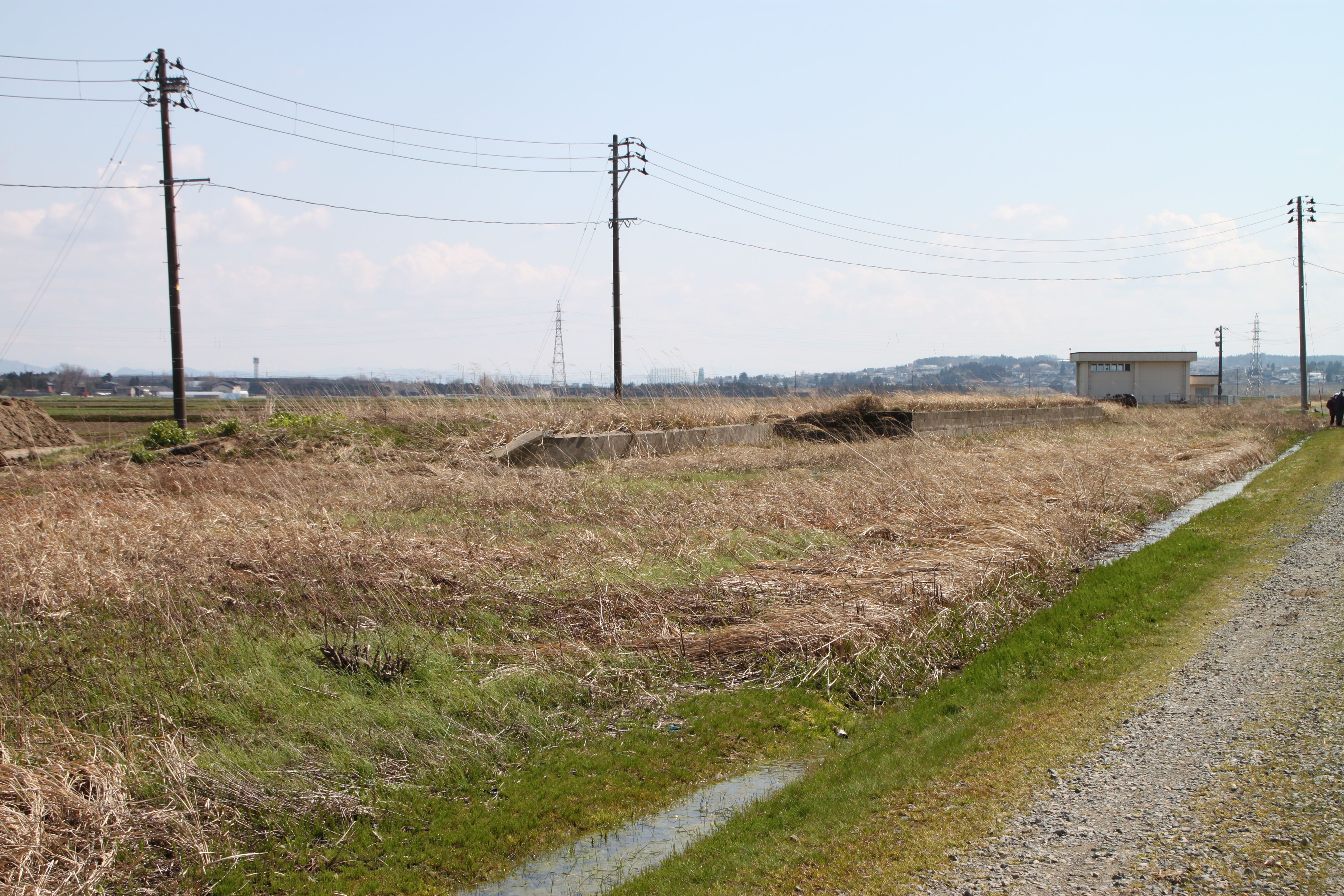 長岡鉄道王寺川駅跡。ホームが残っている。